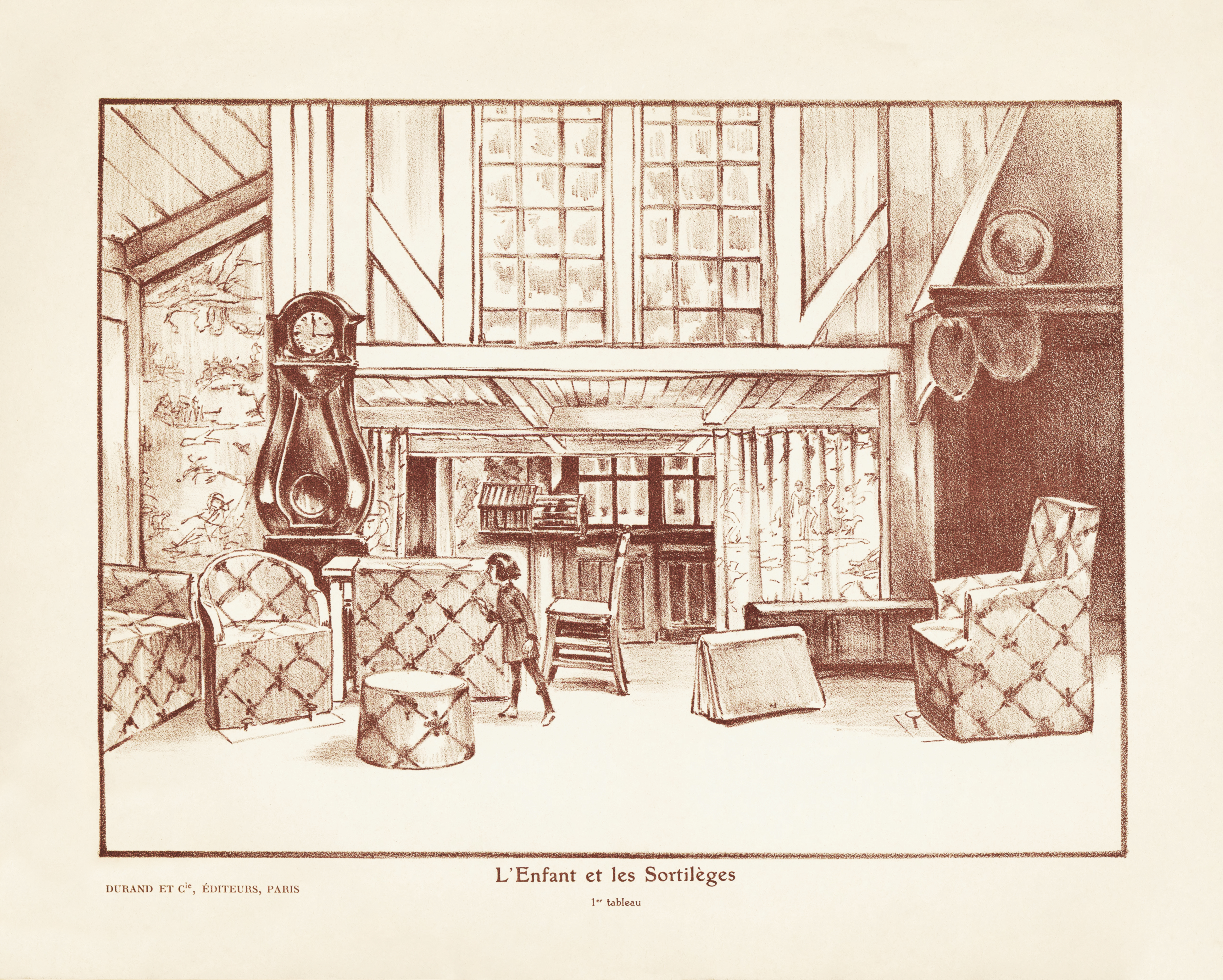 1st scene of Colette and Maurice Ravel's opera L'enfant et les sortilèges, as performed at the Paris première at the Théâtre de l'Opéra-Comique on 1 February 1926